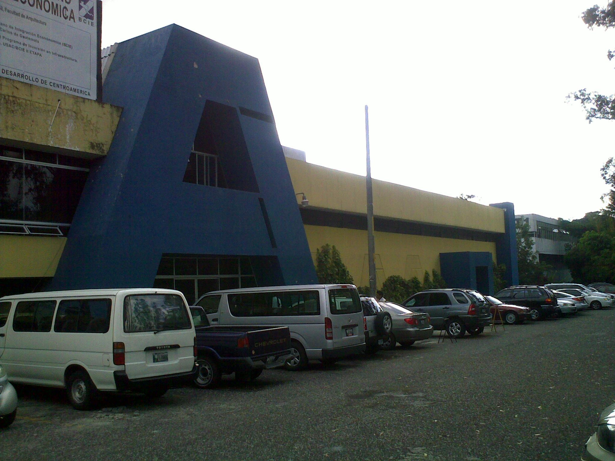 Edificio T2 de la Facultad de Arquitectura de la USAC